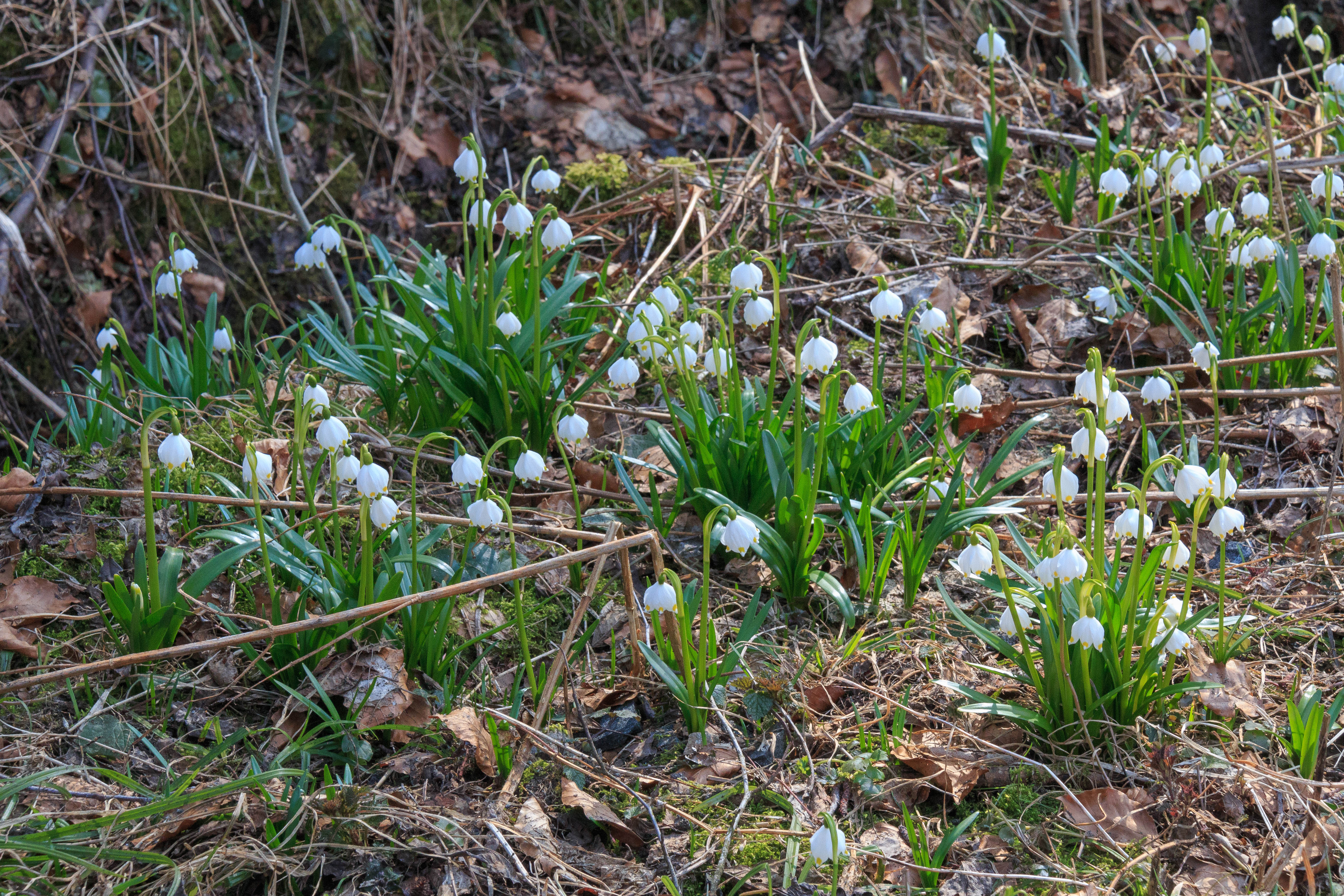 Bledule v NPR Ransko Project: Chráněná území.